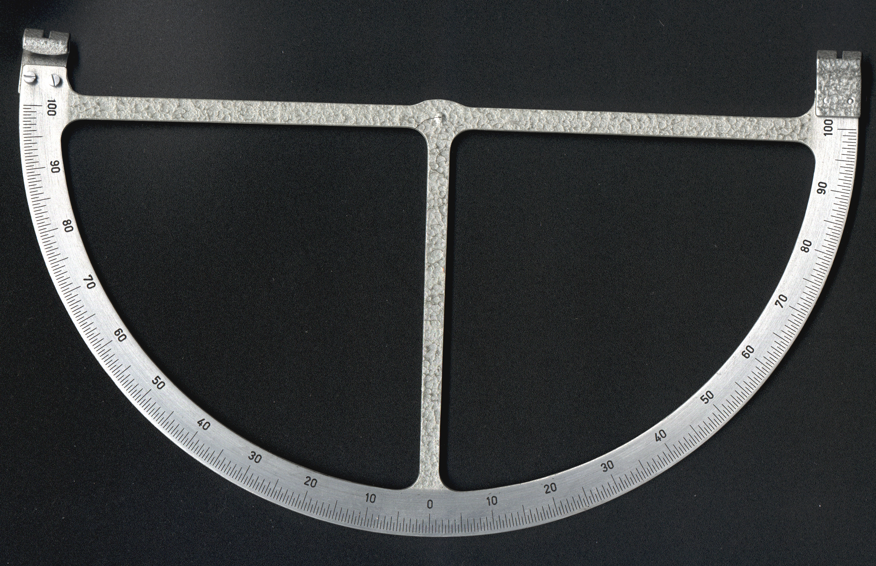 Gradbogen mit 100-Gon-Teilung.